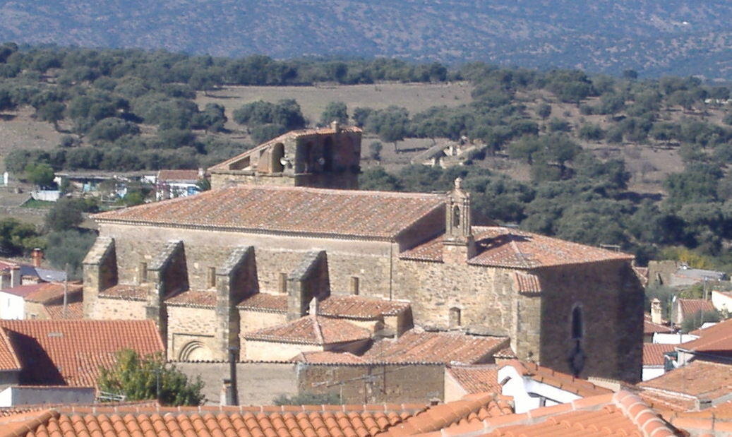 Vista general de la Iglesia de Nuestra Señora de la Asunción de Talaván (Extremadura, España)